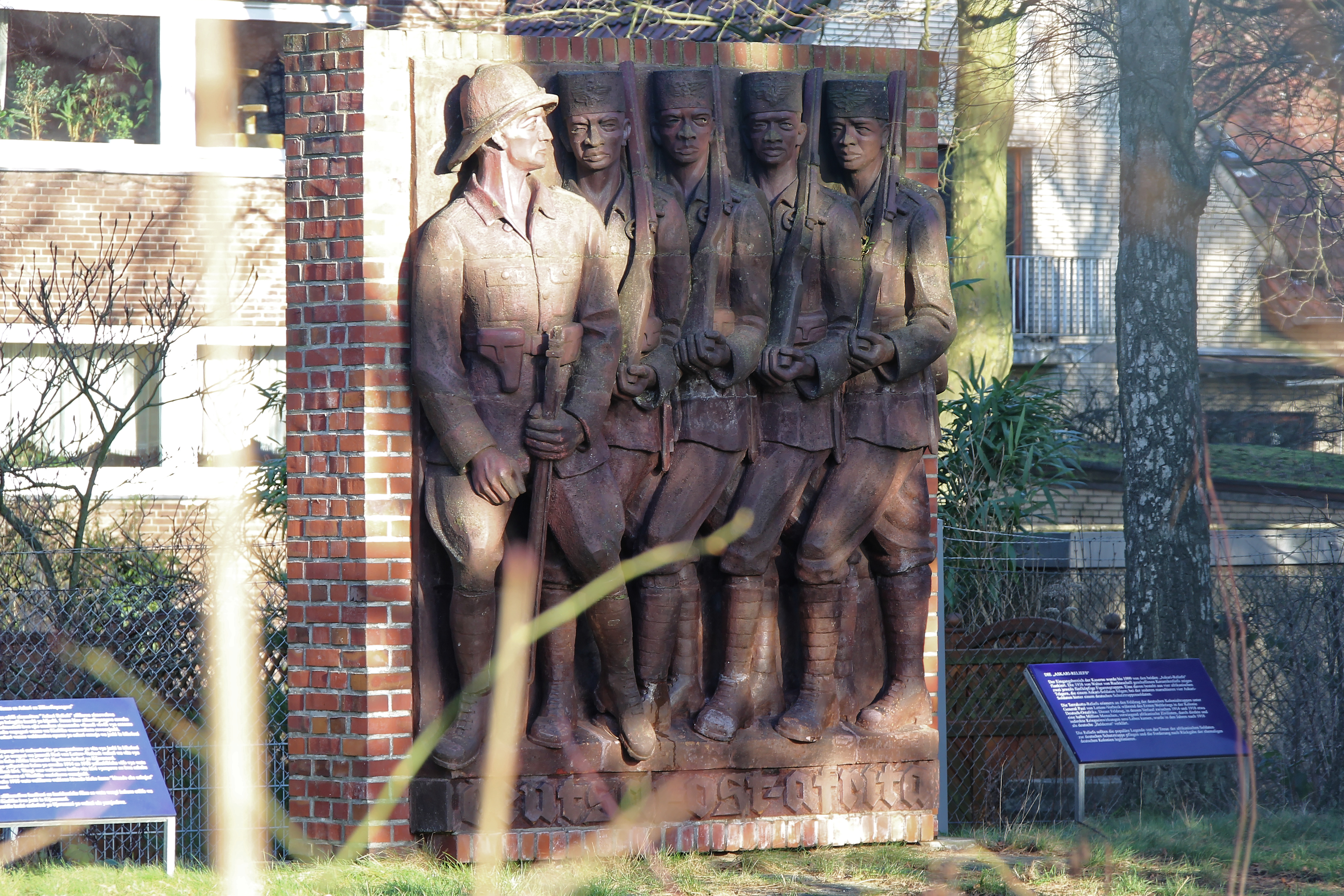 ehemalige Lettow-Vorbeck-Kaserne Hamburg, Tansania-Park, Schutztruppenrelief